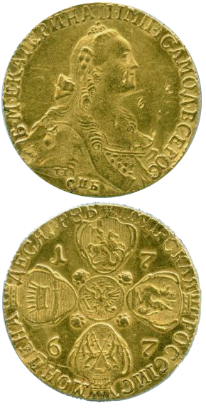 Russia gold 10 rubel 1767